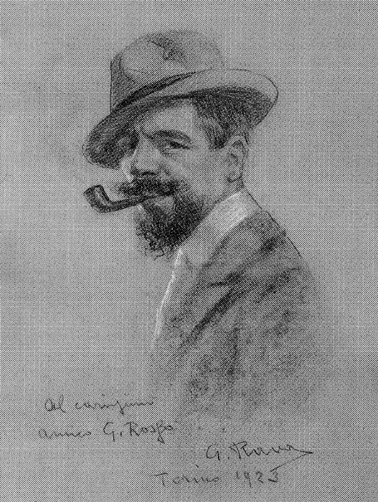 Giovanni Rava, Autoritratto